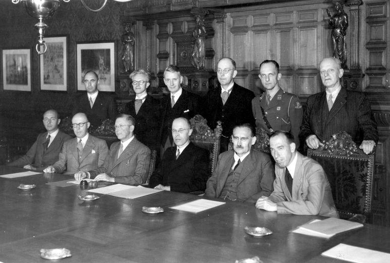 Eerste bijeenkomst nieuwe ministers eerste kabinet Beel. Den Haag, juli 1946. Zittend vlnr: Mansholt, Lieftinck, Ringers, Beel, Drees en Vos. Staand vlnr. Huysmans, Gielen, Boetselaer van Oosterhout, Maarseveen, Fievez en Jonkman.